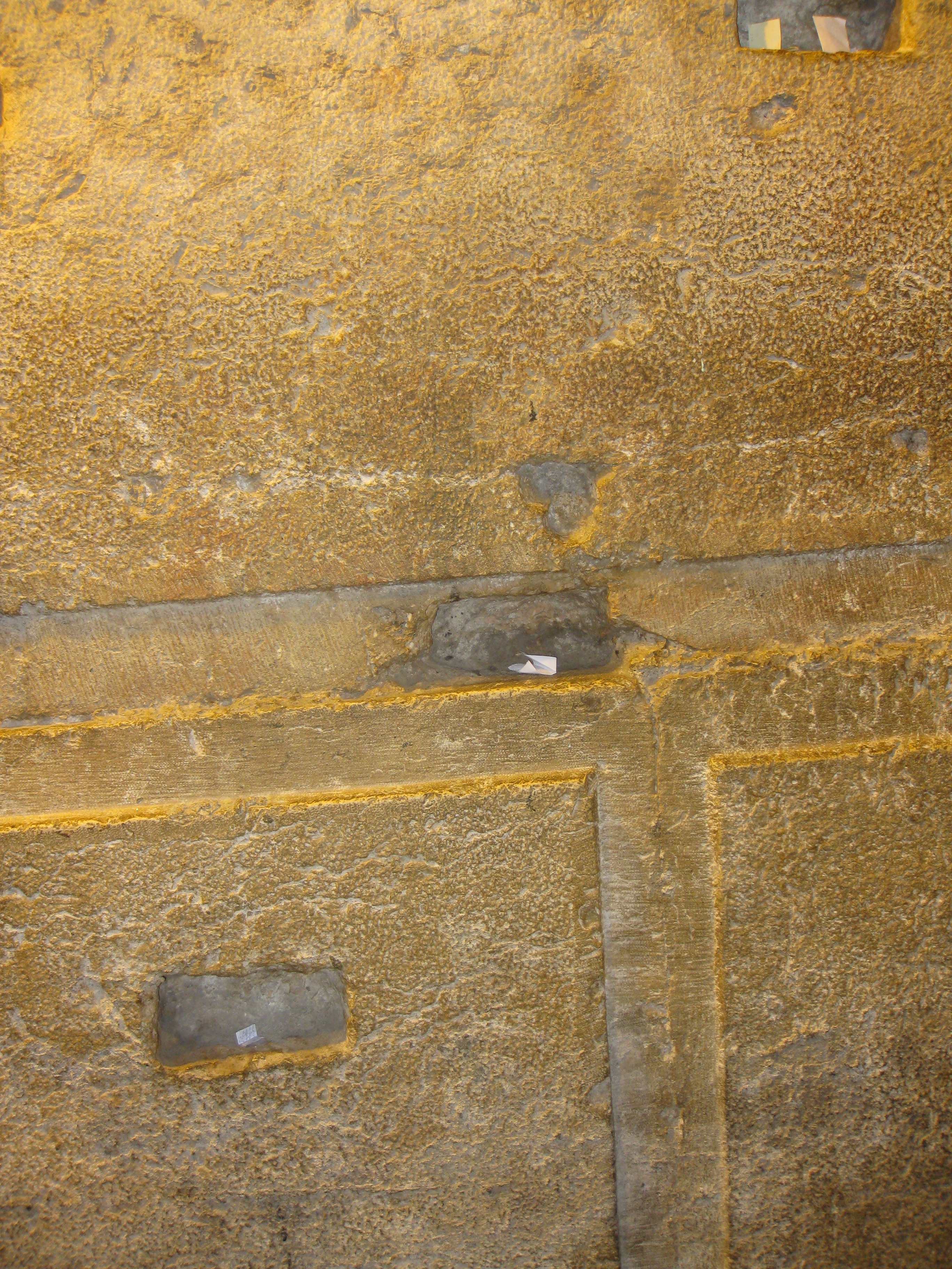 Western Wall Tunnel מנהרות הכותל